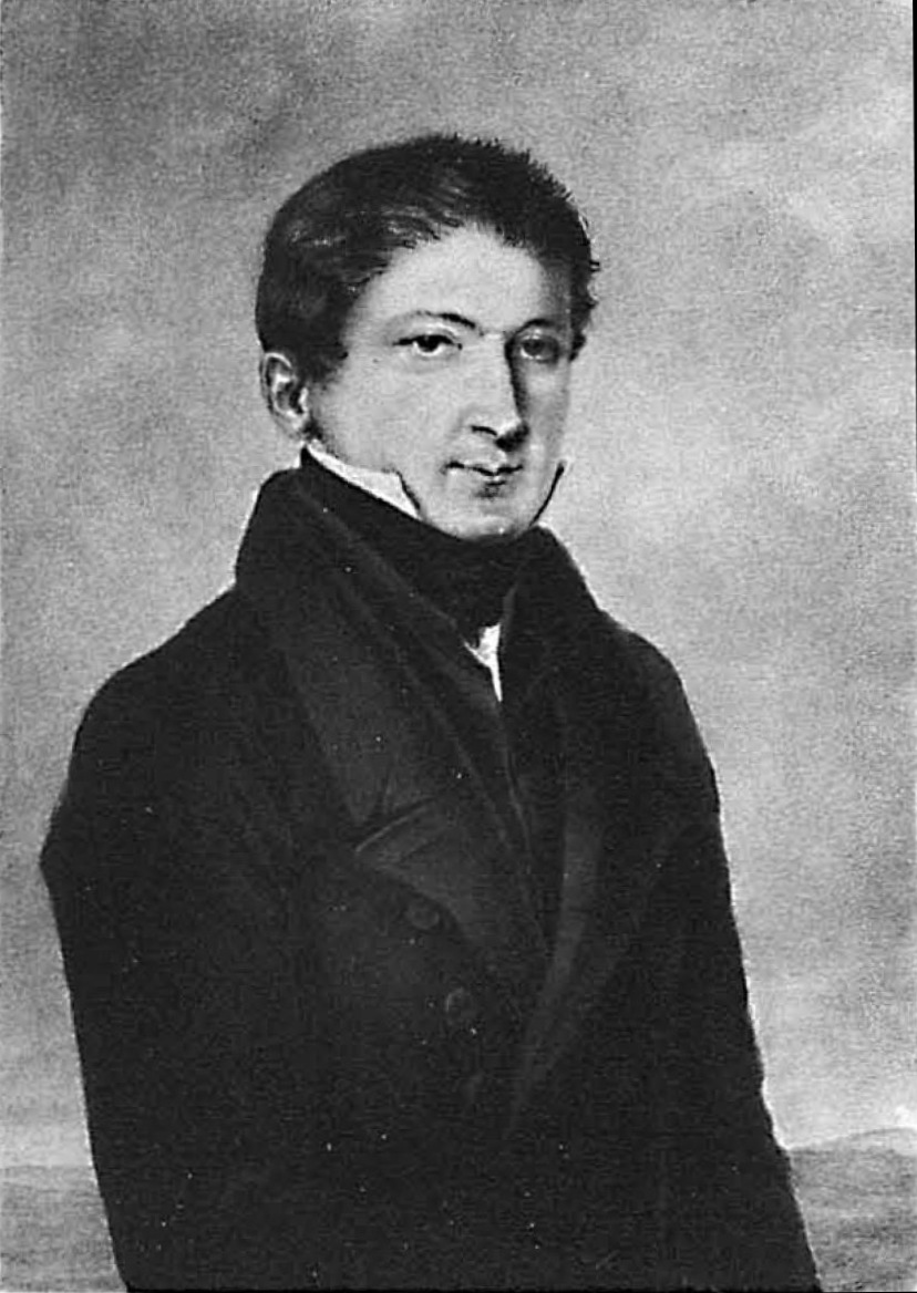 Портрет М.И. Муравьёва-Апостола